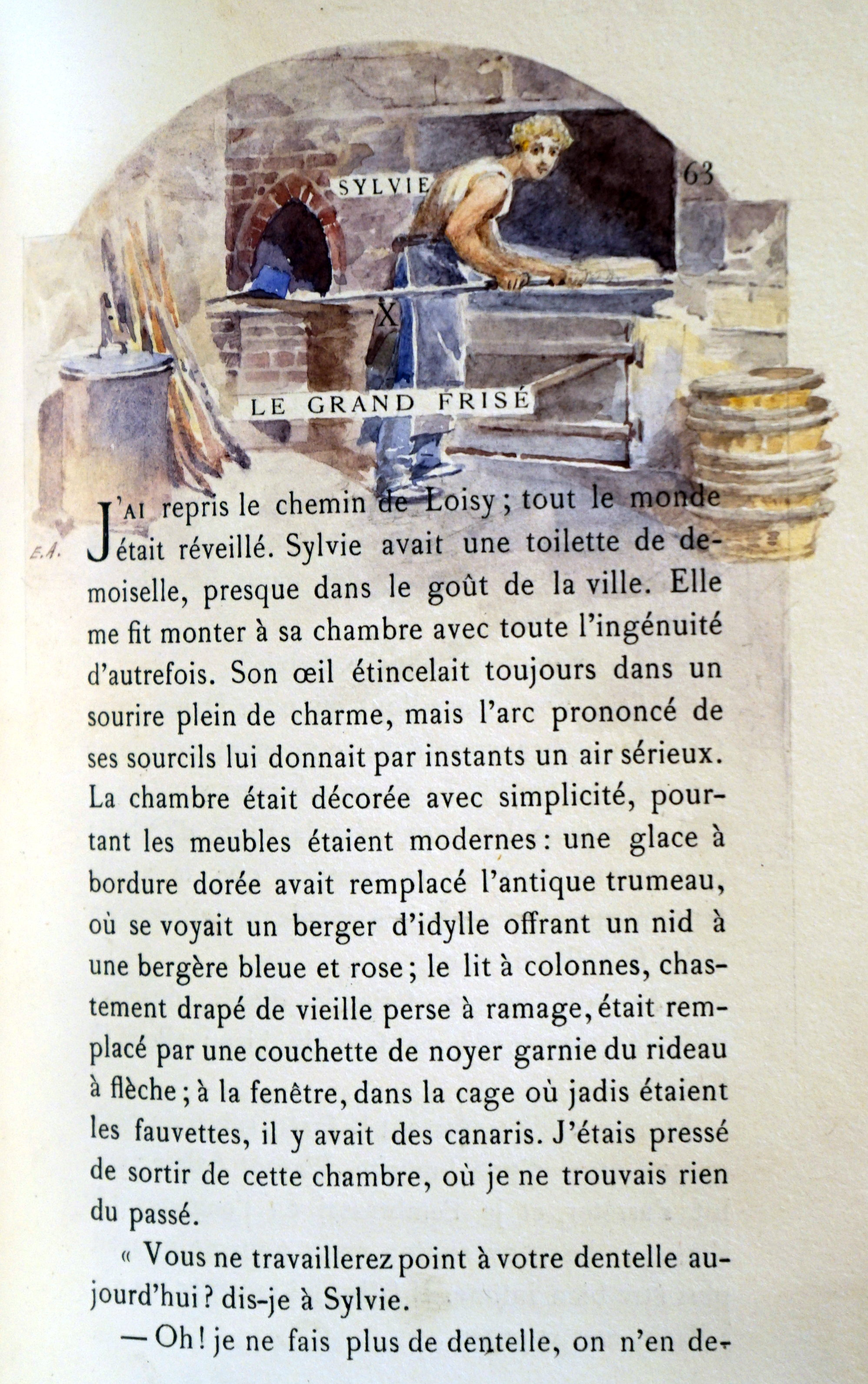 édition illustrée par Auger pour Diancourt.